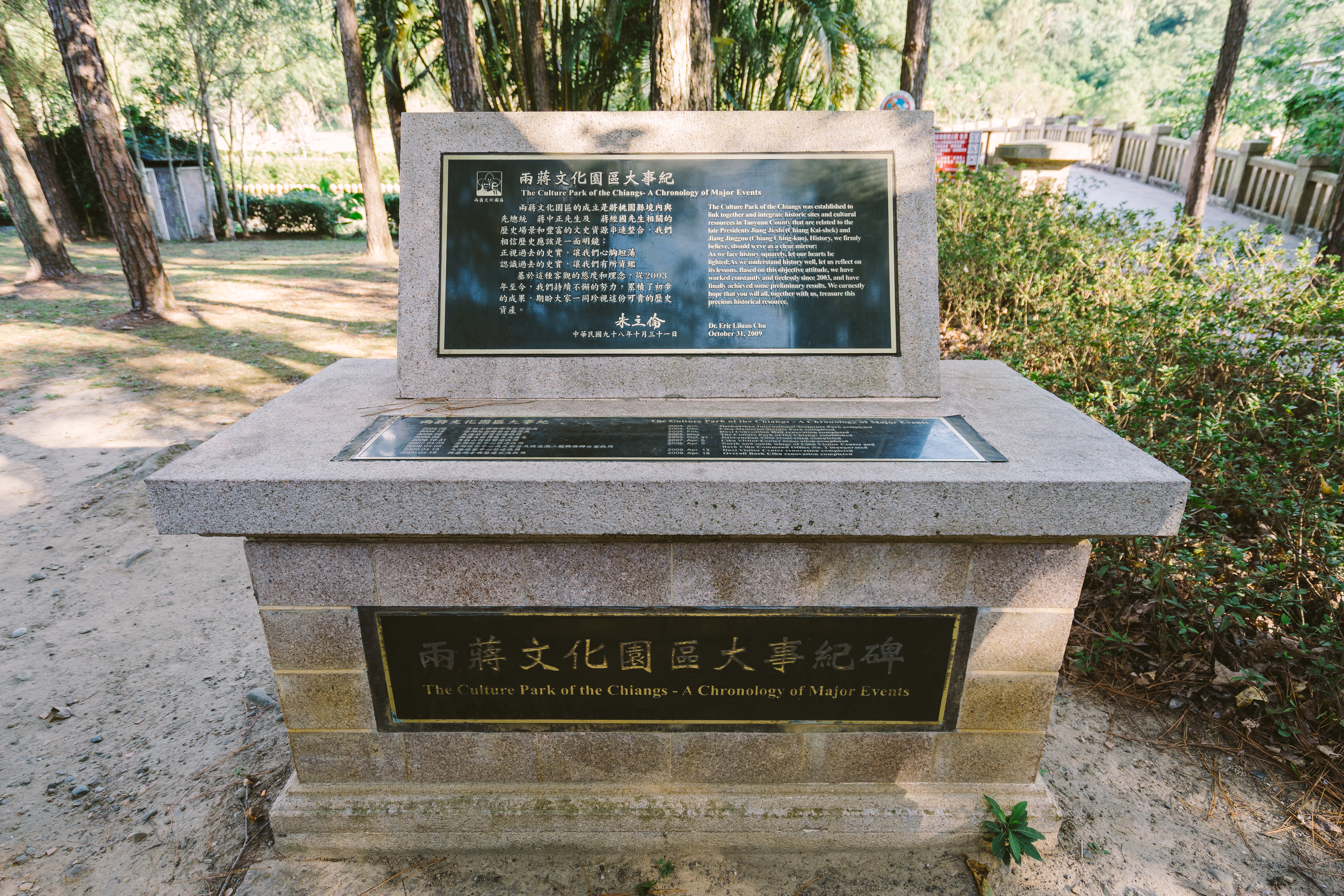 中文（台灣）: 兩蔣文化園區大事紀碑，2009年10月31日立。